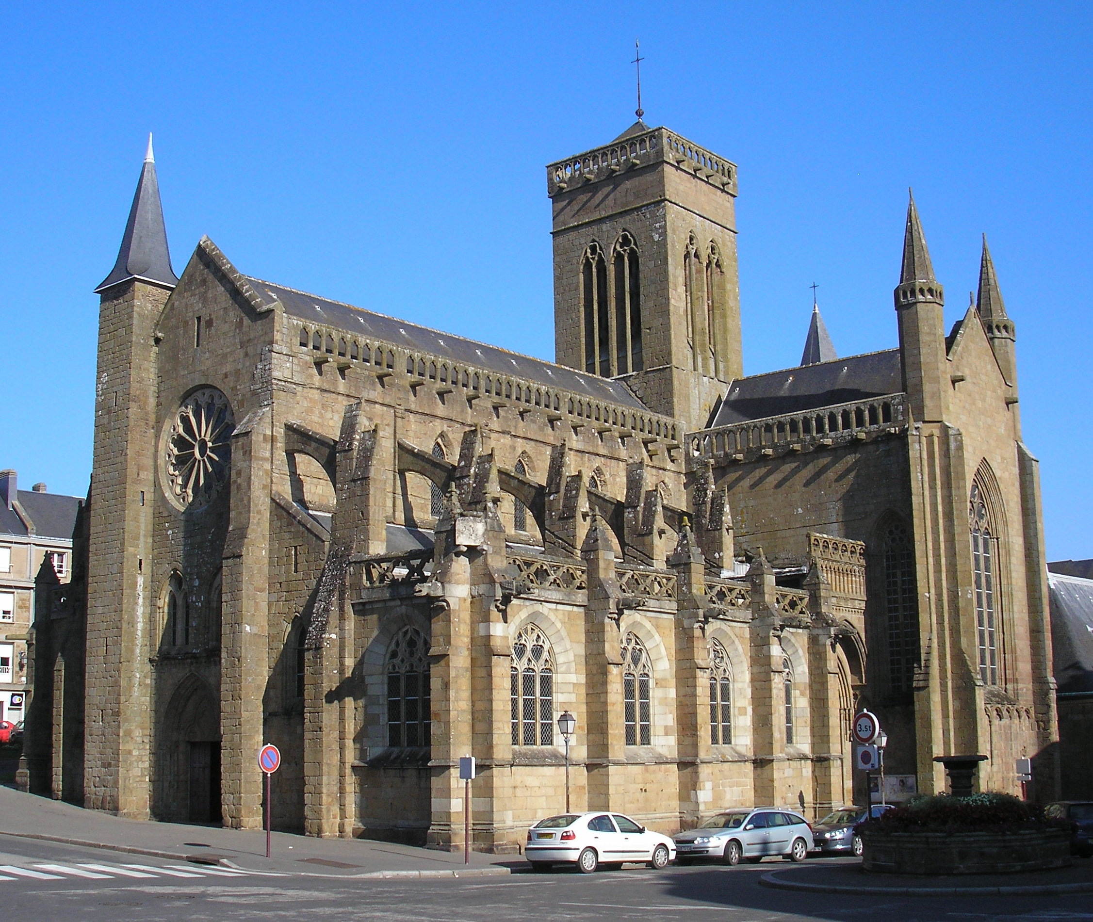 Vire (Normandie, France). L'église Notre-Dame.